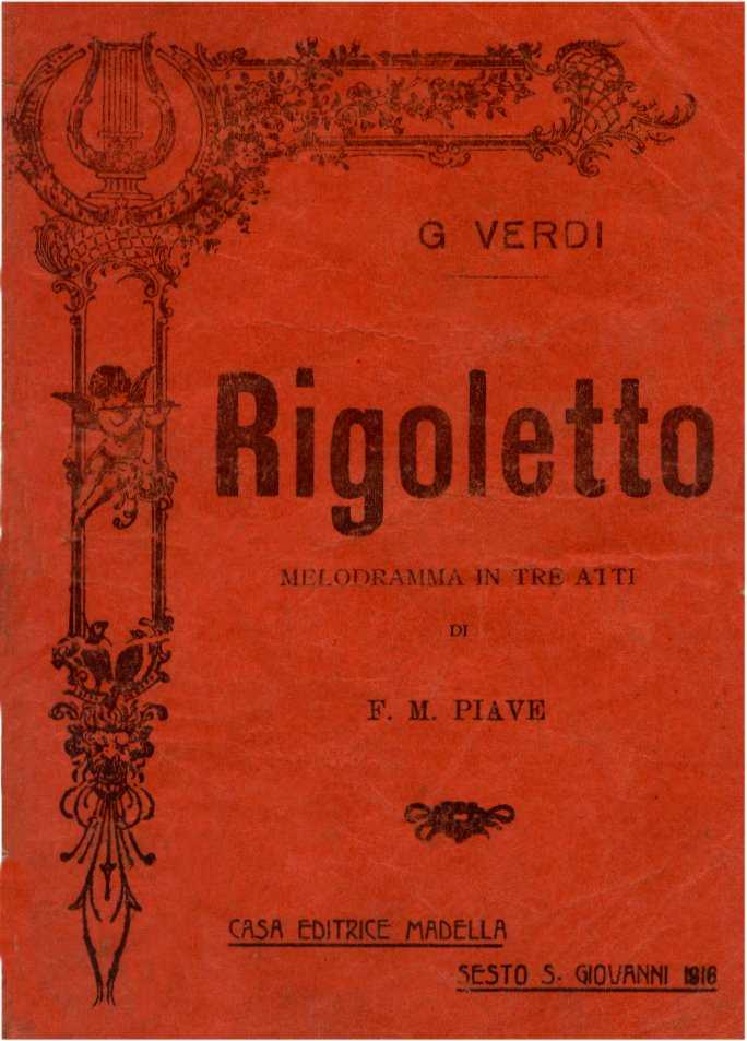 Copertina libretto "Rigoletto" melodramma in tre atti di F.M. Piave musica di Giuseppe Verdii - Casa editrice Madella Sesto San Giovanni 1916